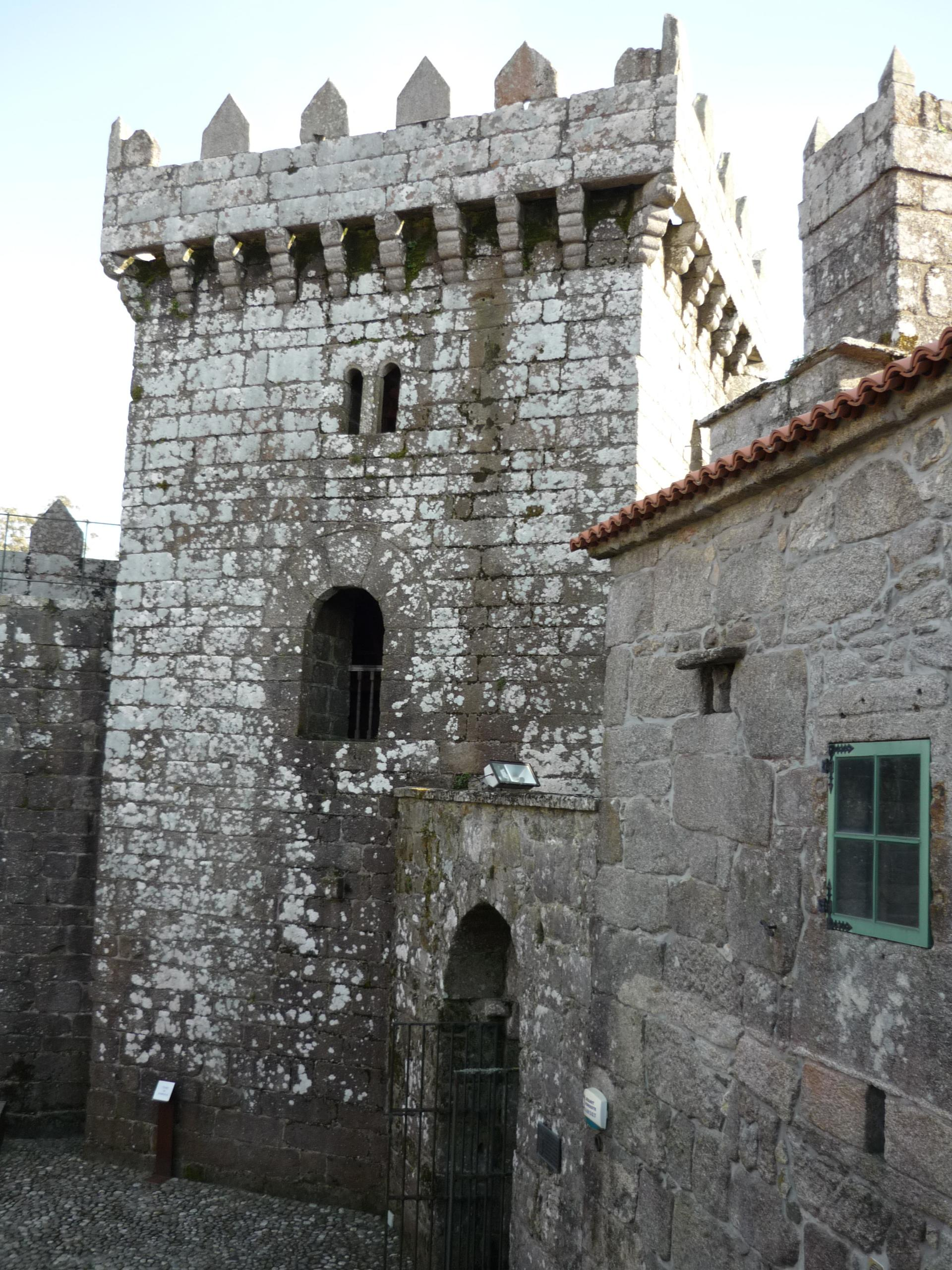 Castelo de Vimianzo